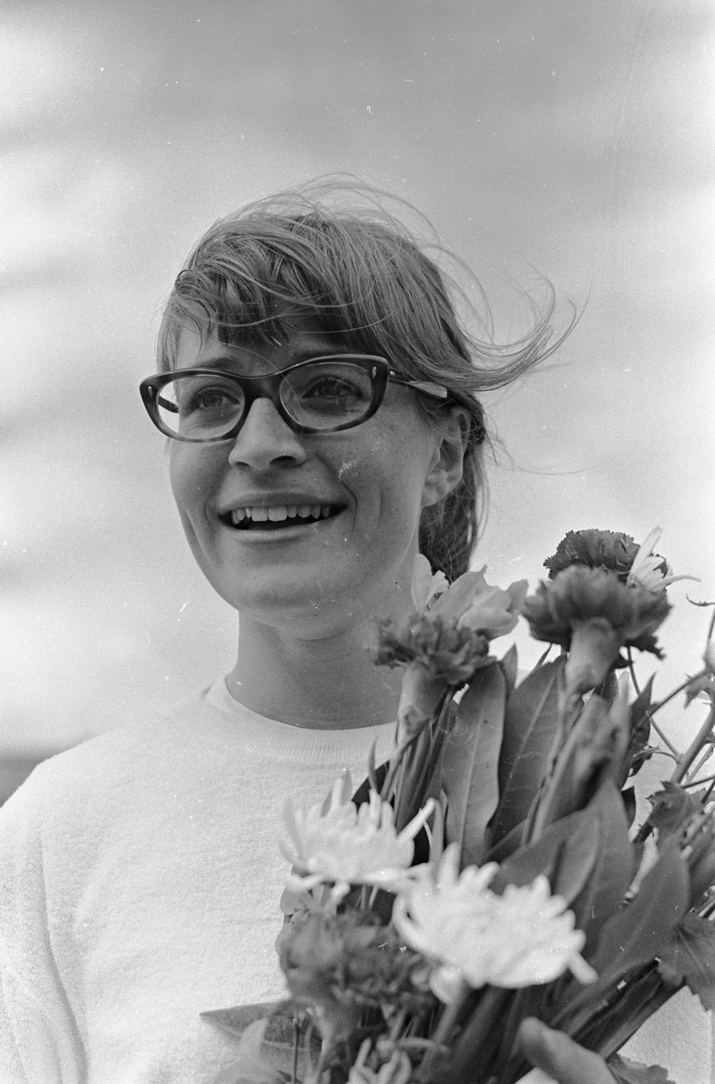 Collectie / Archief : Fotocollectie Anefo Reportage / Serie : [ onbekend ] Beschrijving : Nederlandse Atletiekkampioenschappen Rotterdam. 100m dames Wilma van den Berg wint Datum : 13 augustus 1967 Locatie : Rotterdam, Zuid-Holland Trefwoorden : atletiek, kampioenschappen Persoonsnaam : Berg, Wilma van den Fotograaf : Jongerhuis, Pieter / Anefo Auteursrechthebbende : Nationaal Archief Materiaalsoort : Negatief (zwart/wit) Nummer archiefinventaris : bekijk toegang 2.24.01.05 Bestanddeelnummer : 920-5962